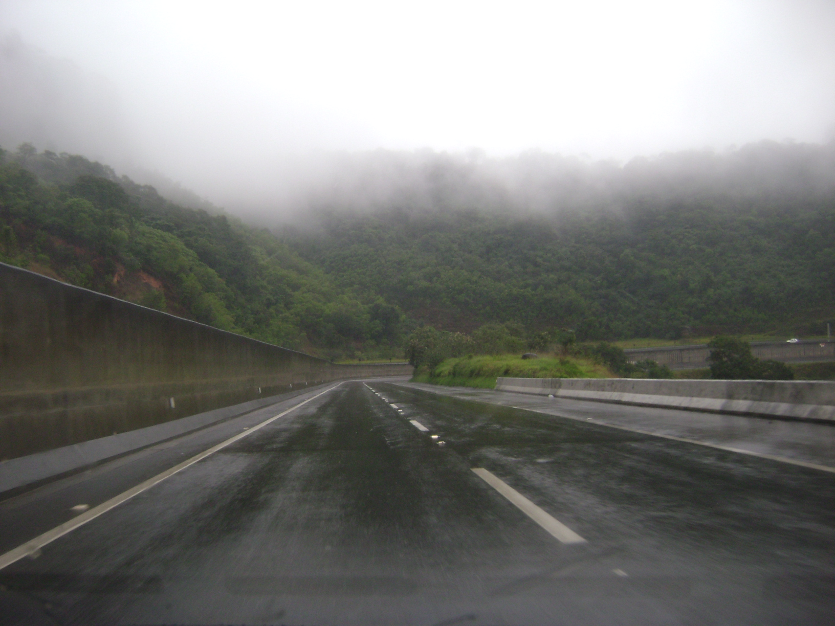 Trecho da Rodovia Mogi-Dutra (SP-88) que cruza a Serra do Itapety, em Mogi das Cruzes.